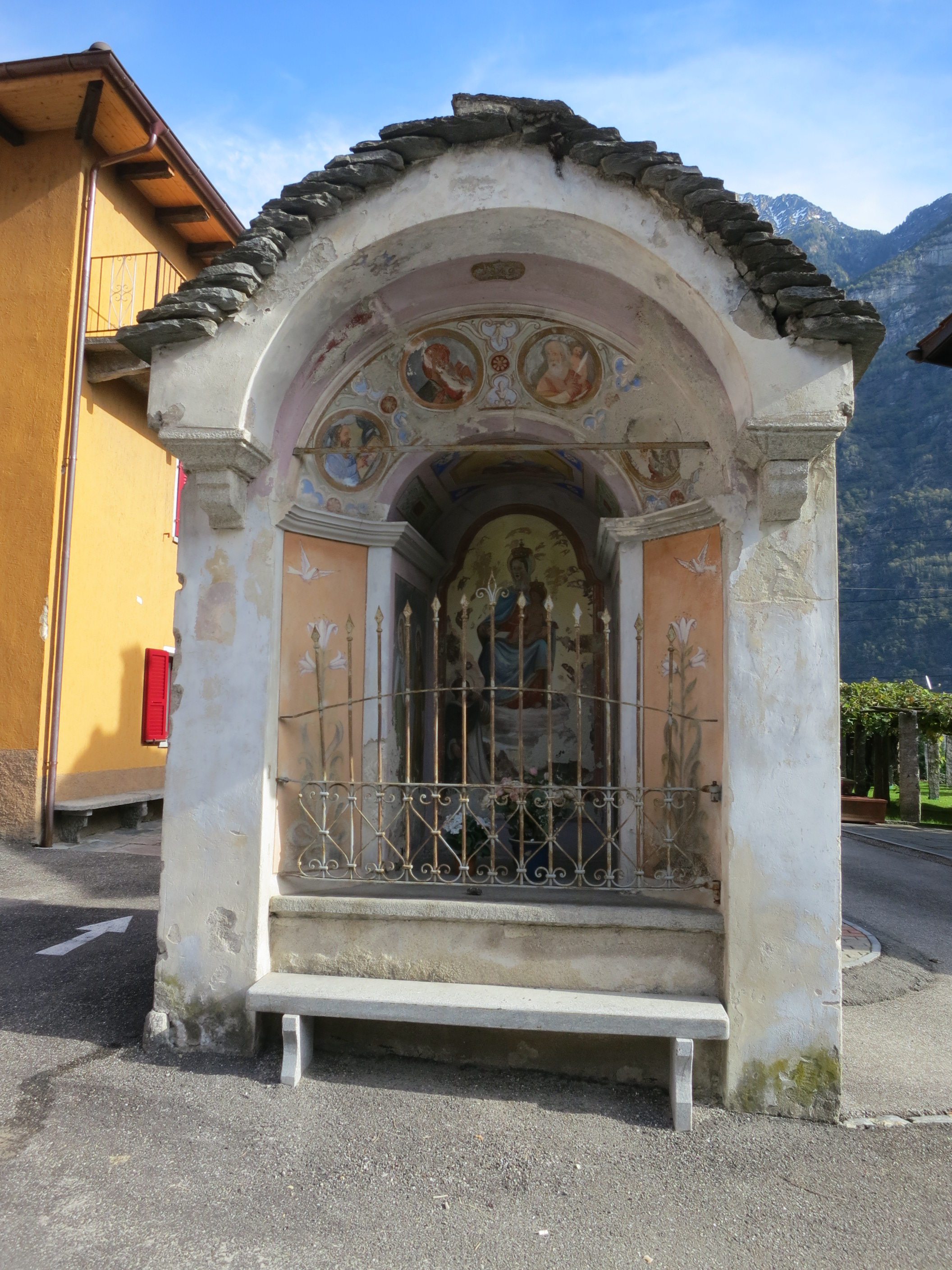 Iragna TI, Schweiz